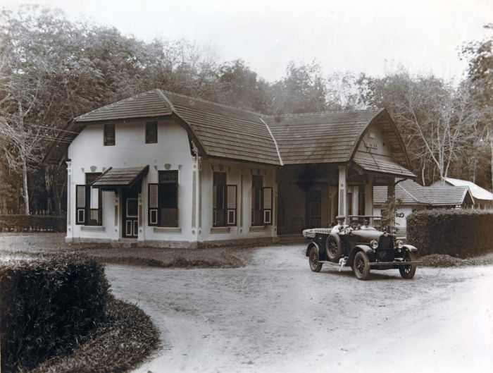 Foto. Een auto voor het kantoor van emplacement Limau Manis